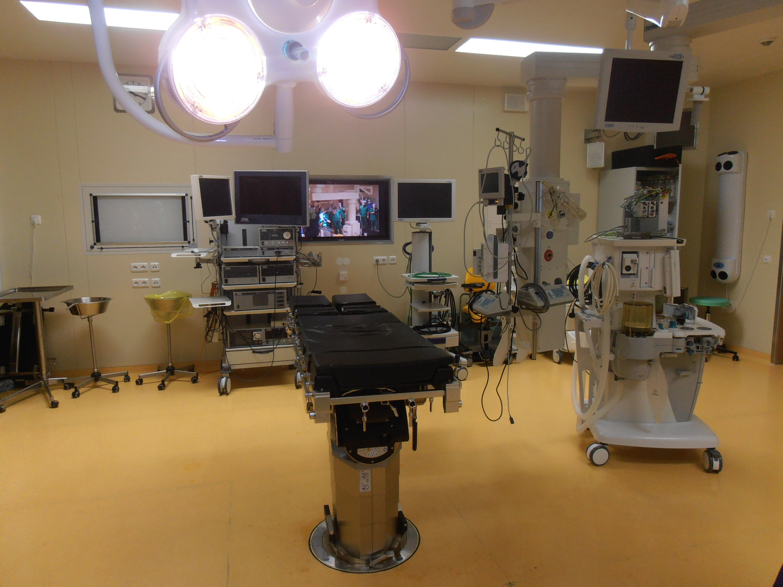 Операционный блок. Система телемедицины. Федеральный центр нейрохирургии в Тюмени (пос. Патрушево, Червишевский тракт, 4-й км, дом 5).